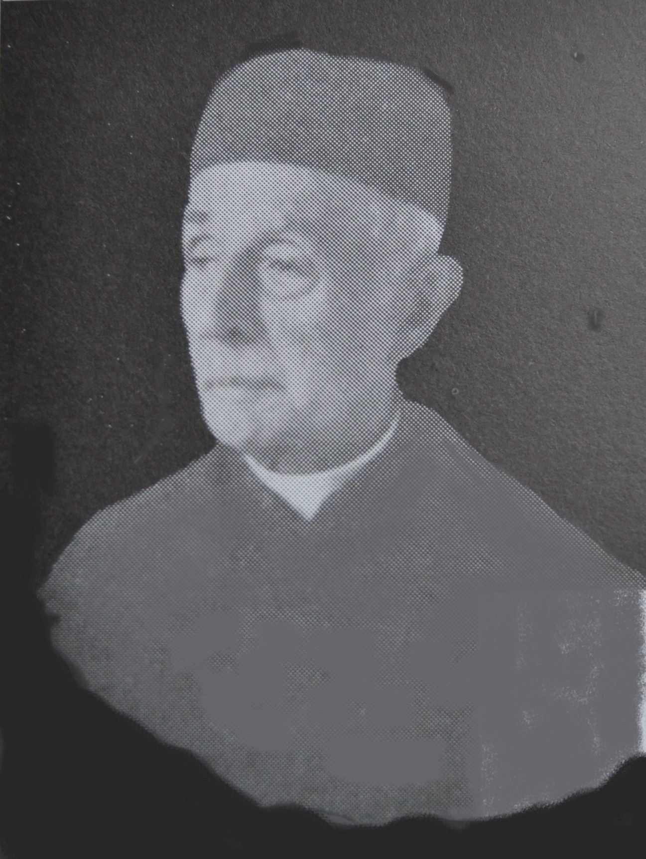 tratto dalla rivista Societas, n.3, 1959.